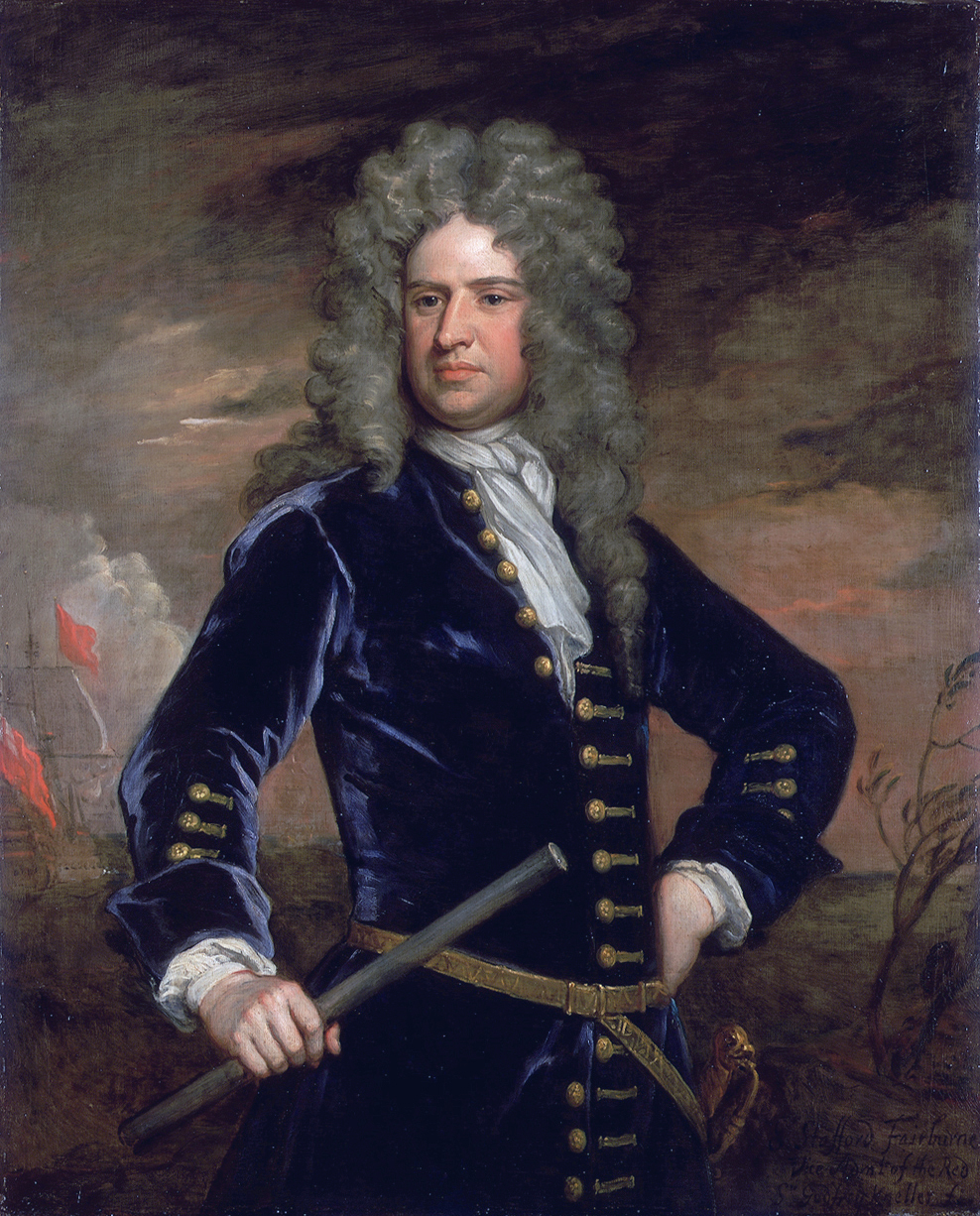 Portrait de Stafford Fairborne (1666-1742), officier de marine britannique. Admiral of de fleet en 1708. Huile sur toile par Sir Godfrey Kneller